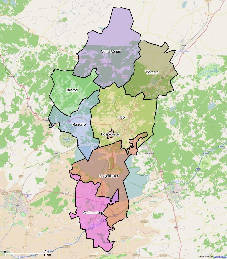 Distriktsindelningen i Höörs kommun World file: 64.05995490629032929 0 0 -64.05995490629032929 1476701.93229217478074133 7577946.21336928941309452